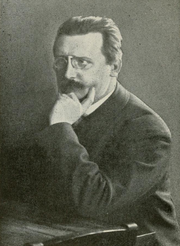 Hornjoserbsce: Portret Jana Rječki (1878–1915); wučer a serbski hudźbny prócowar.